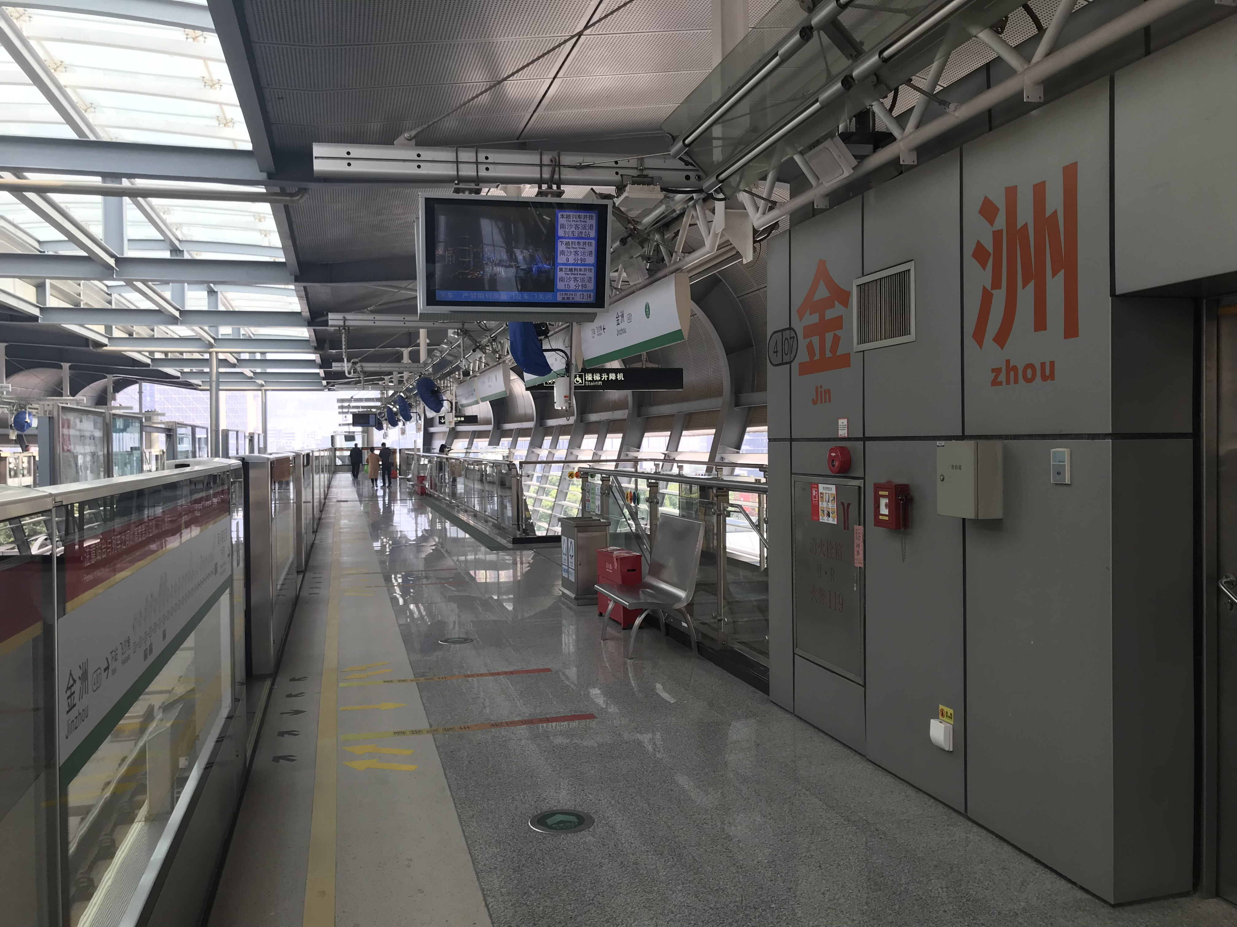 广州地铁金洲站